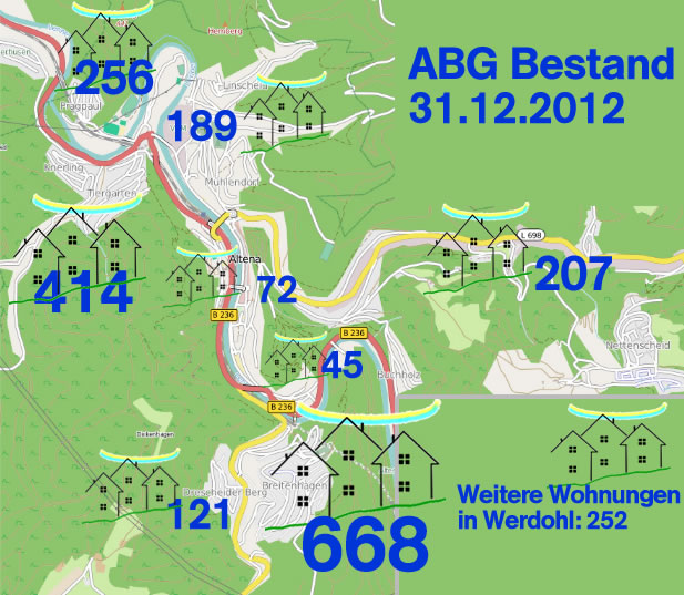 So verteilen sich die Wohnungen im Altenaer Stadtgebiet